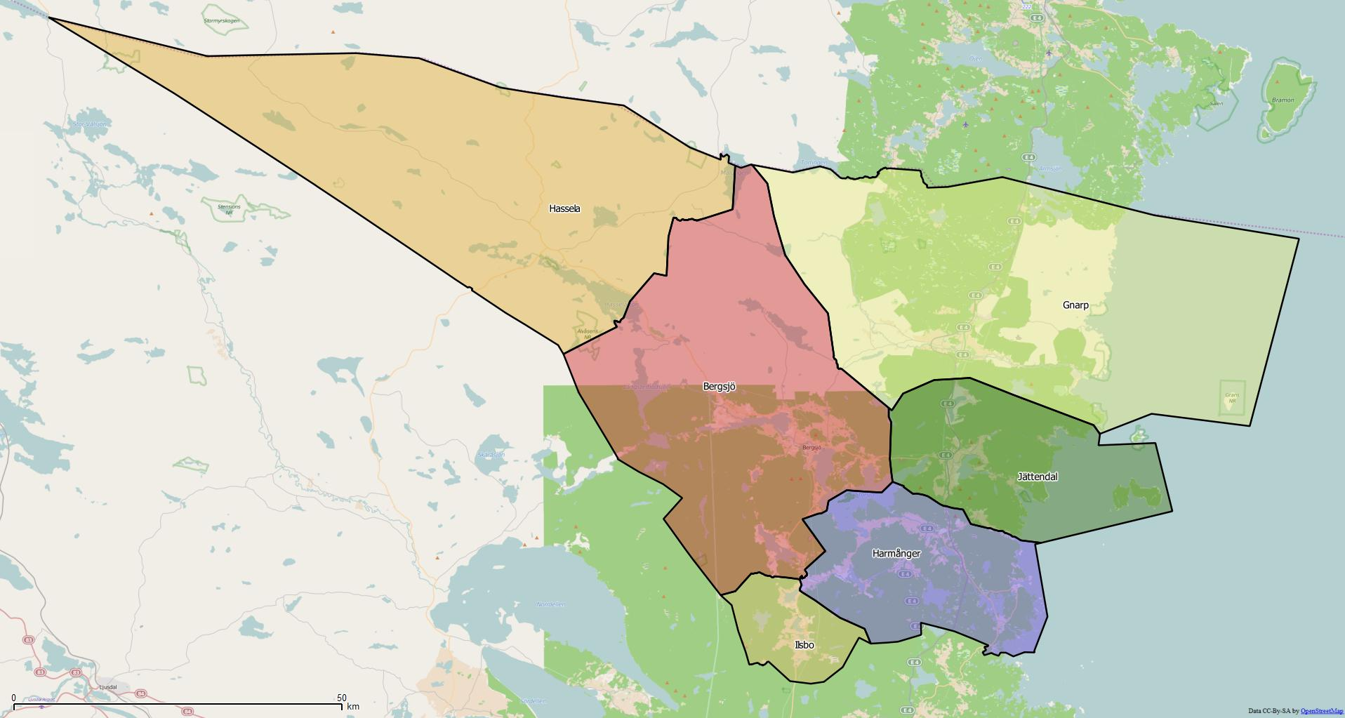 Distriktsindelningen i Nordanstigs kommun World file: 106.98282087388524531 0 0 -106.98282087388524531 1775302.37894834624603391 8923422.23282806016504765